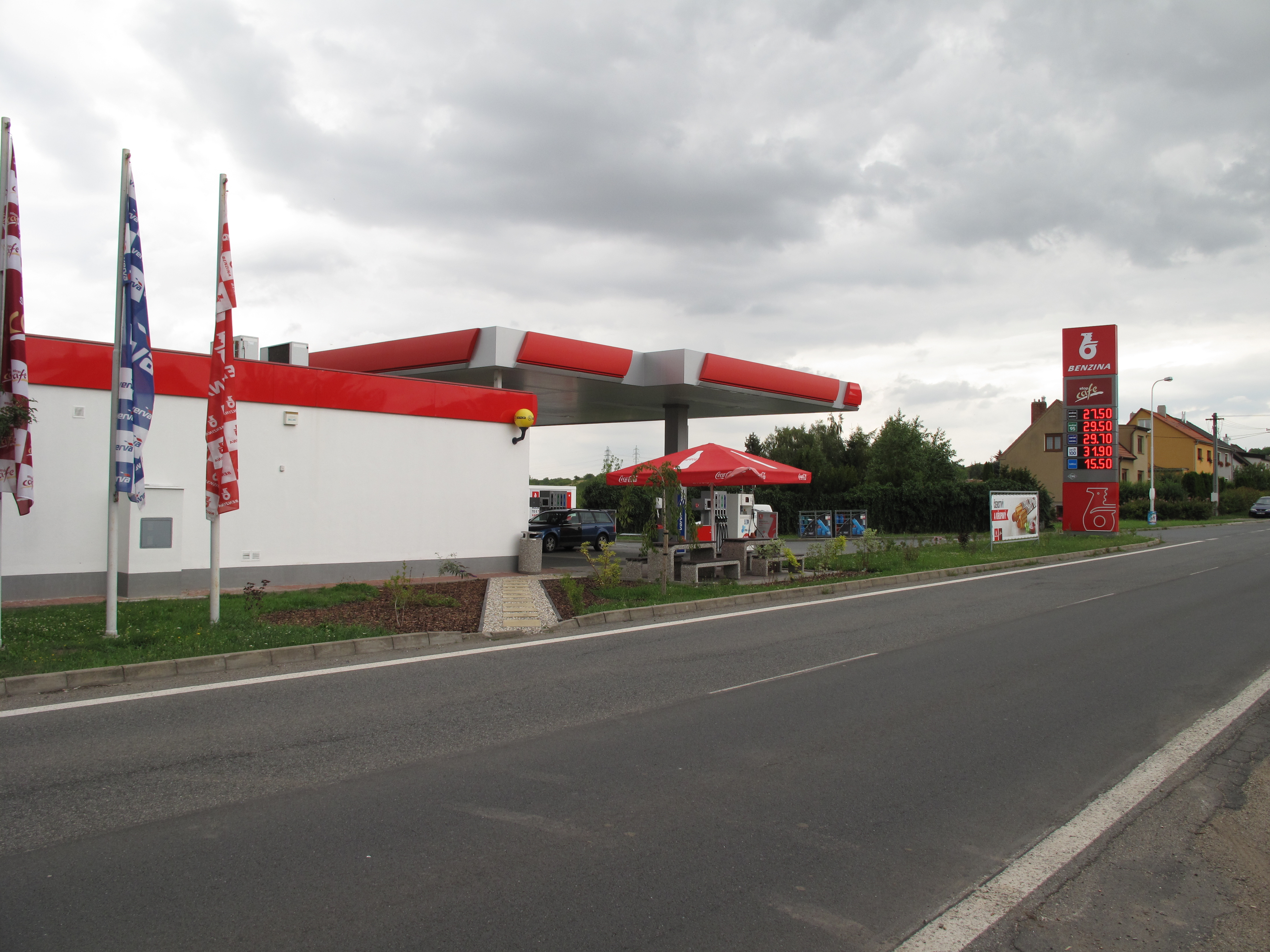 Slaný. Okres Kladno, Česká republika.